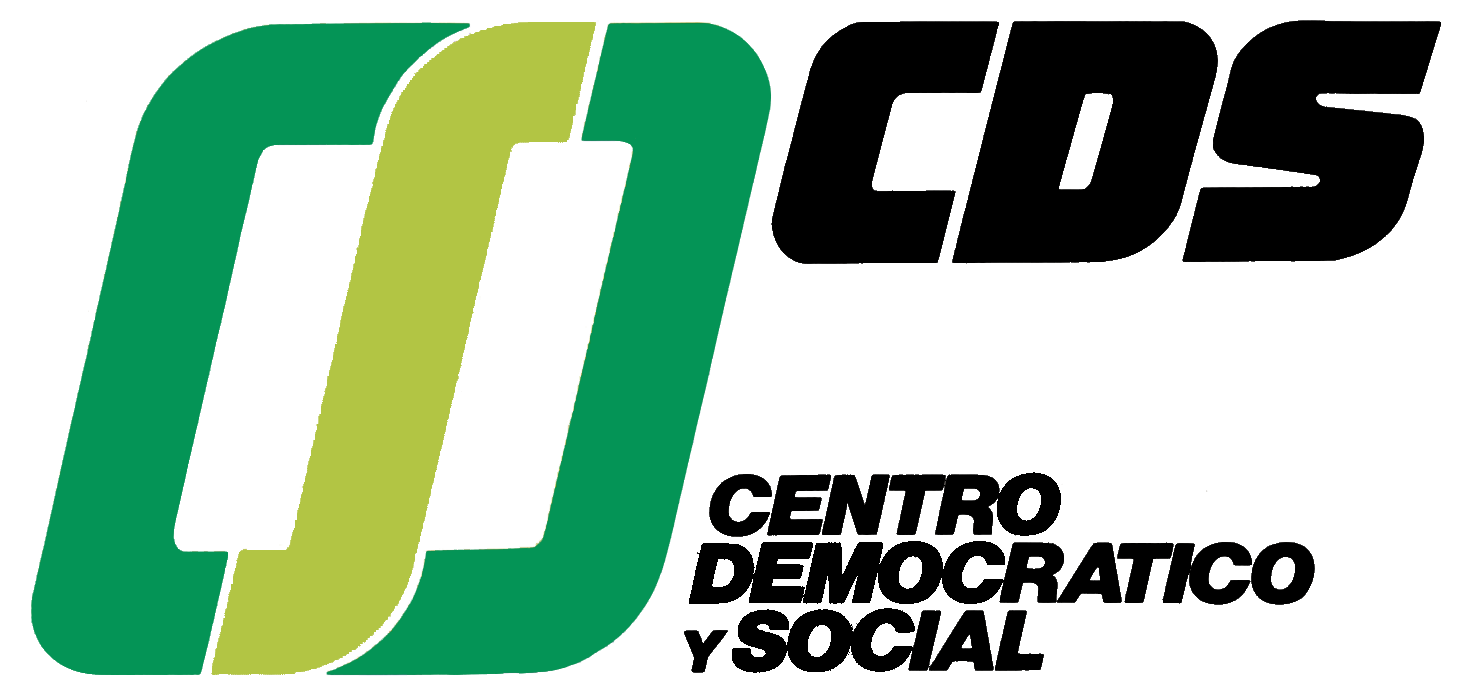 Logotipo del partido político Centro Democrático y Social, en España.